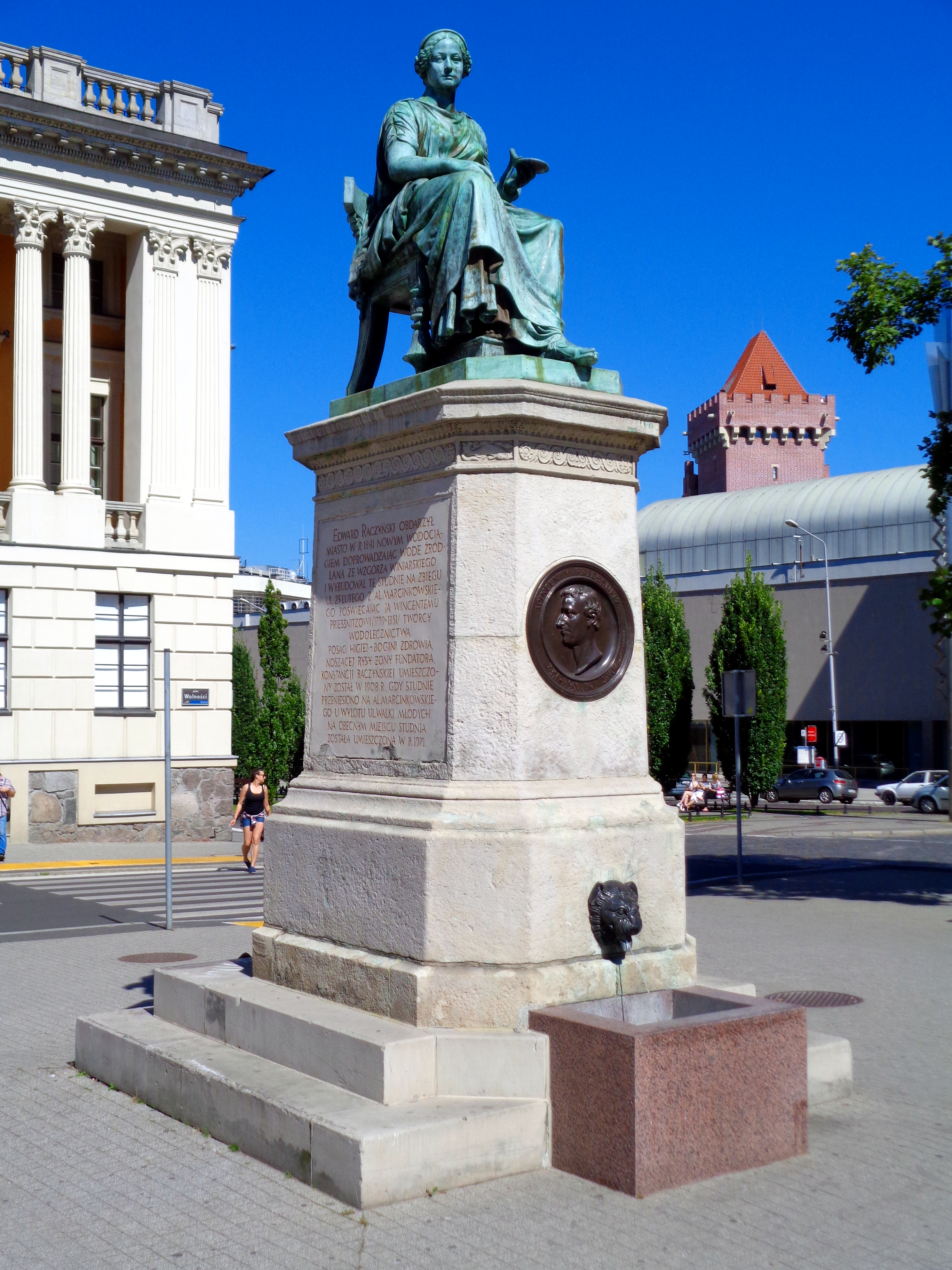 Fontanna Higiei na Placu Wolności w Poznaniu